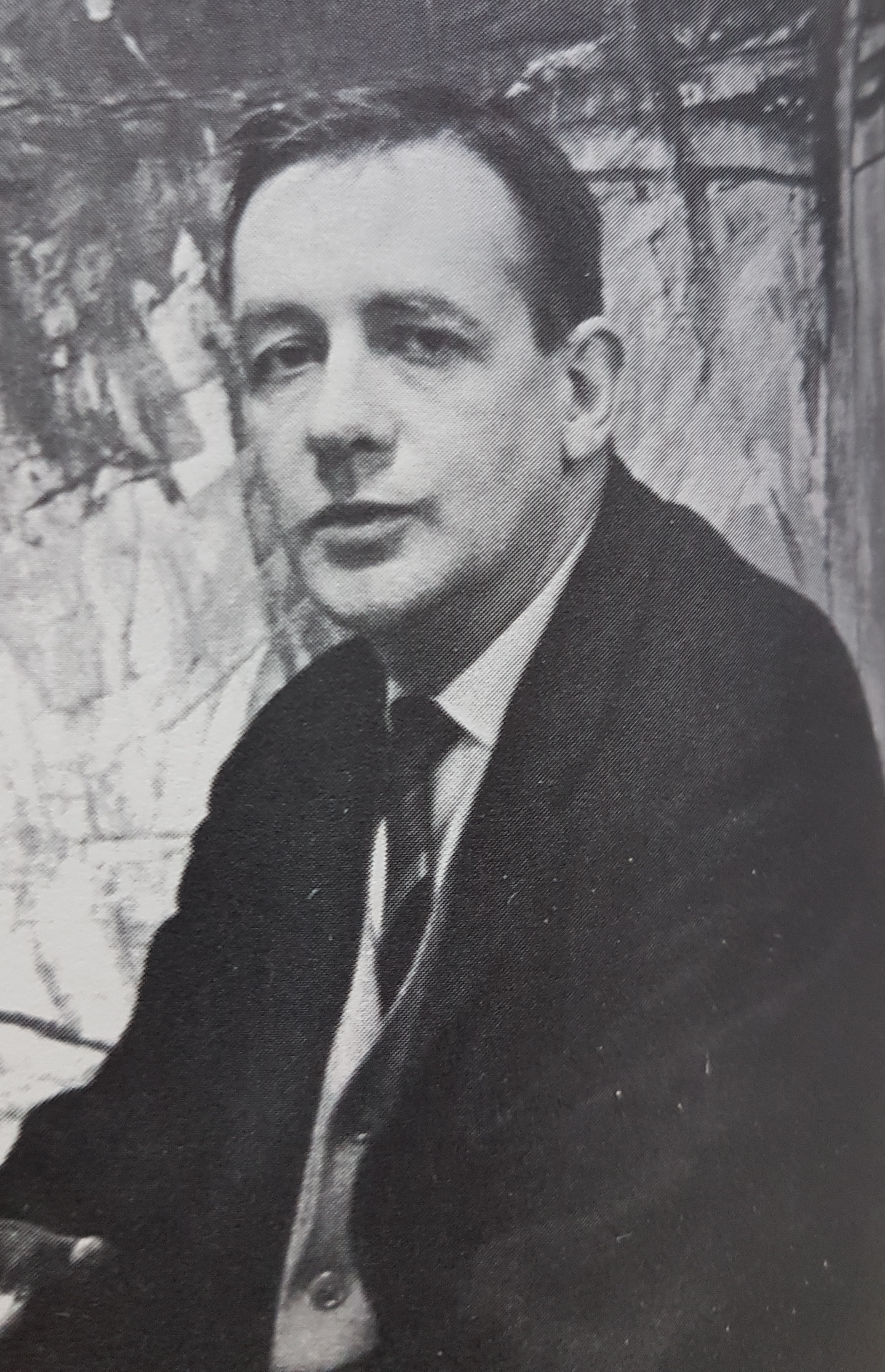 Janne Lundgren Artist from Sweden